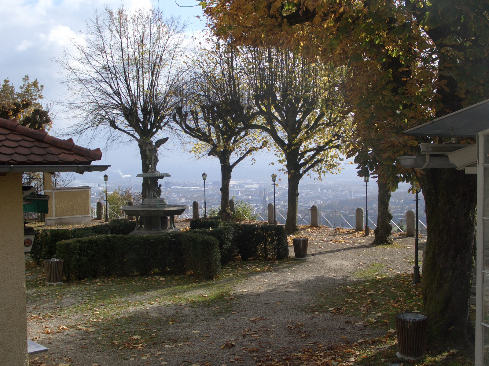 Shut, sadly